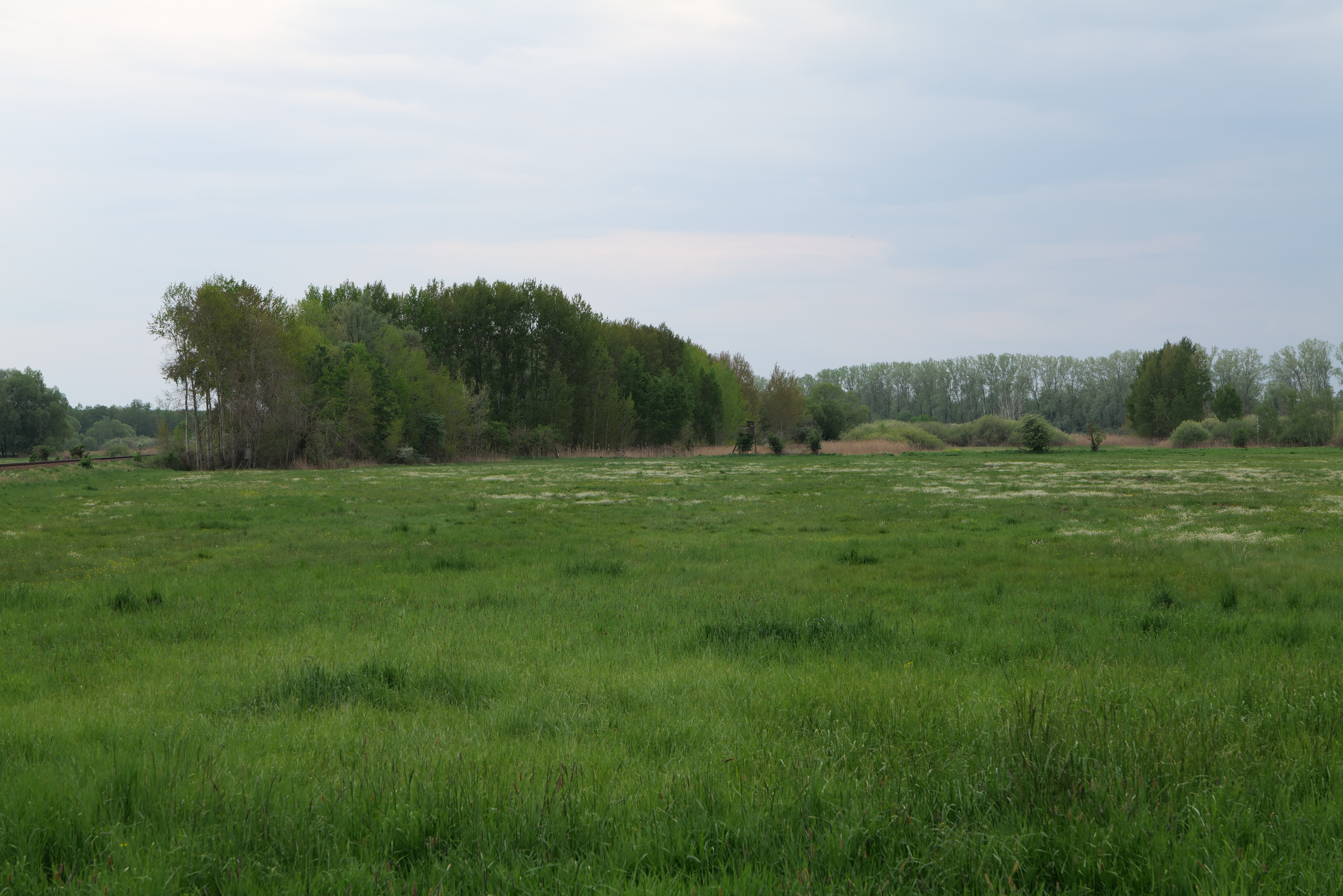 Kremmener Luch am 10. Mai 2020.